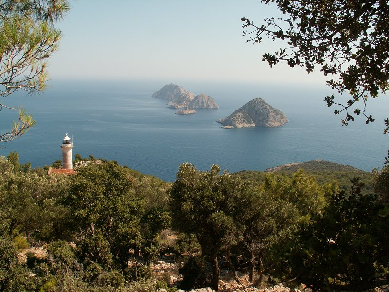 Cape Gelidonya